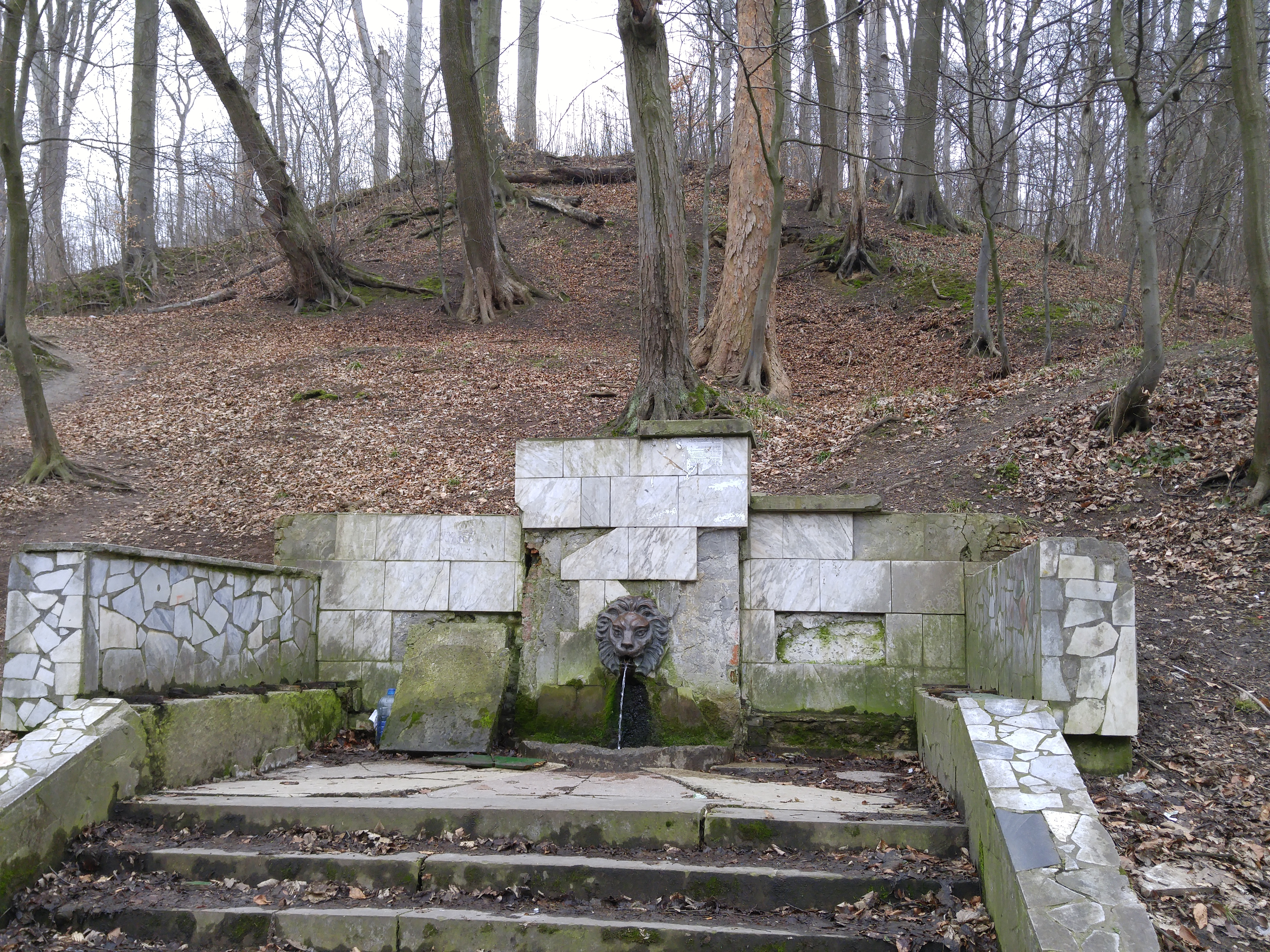 Джерело у парку "Залізна Вода", Львів. Оформлене у вигляді "Паща лева" з підходом по сходах (з початку 1980-х).